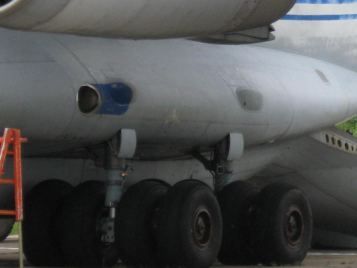 Шасси Ил-76 (лев. основн.)